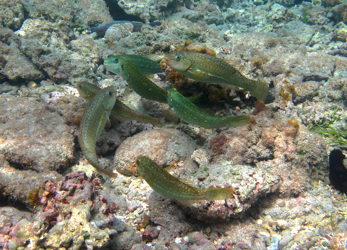 Un groupe de poissons-perroquets des herbiers (Leptoscarus vaigiensis) à la Réunion. Les mâles ont une bande latérale blanche.